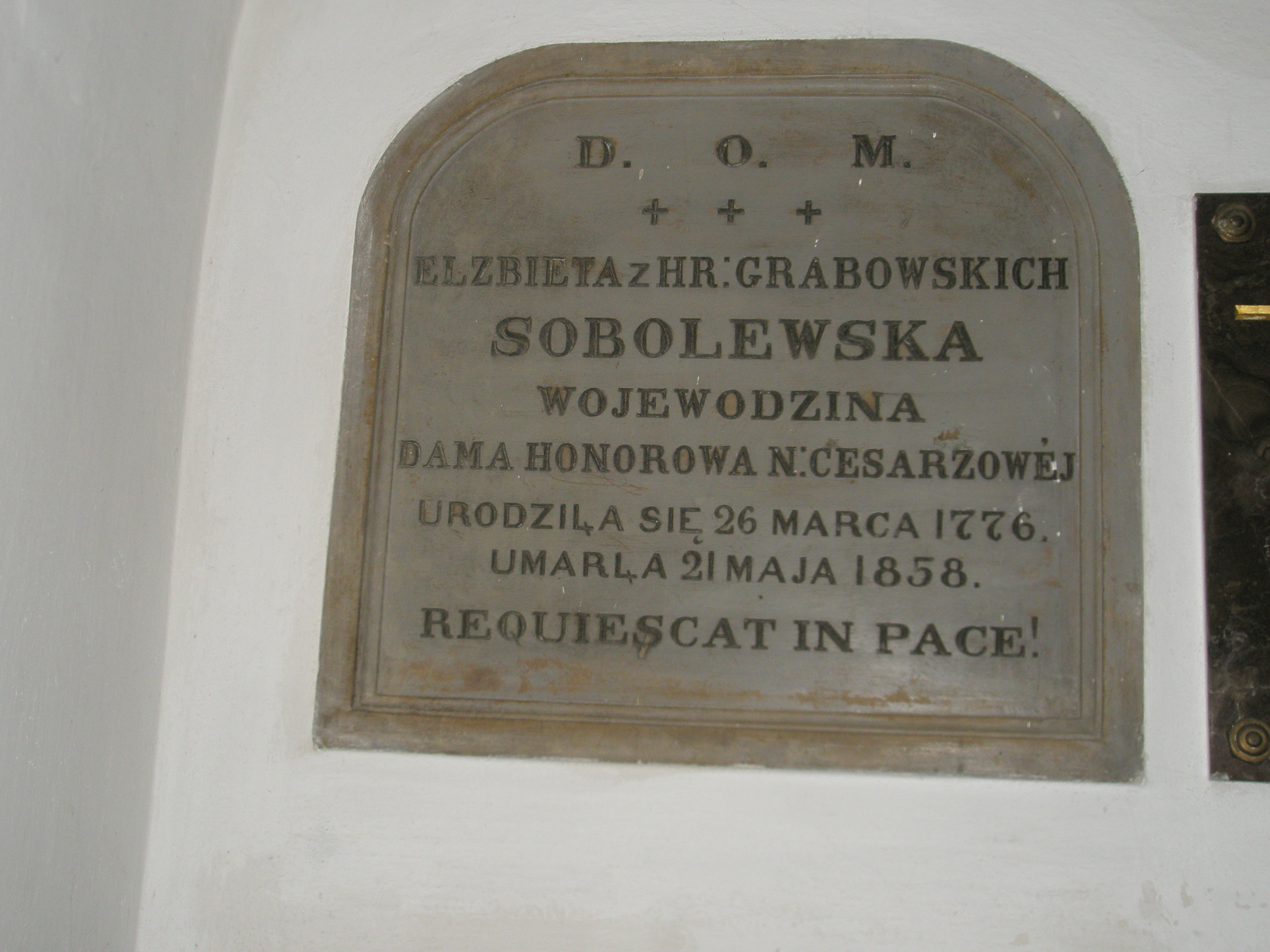 Tablica nagrobna Izabeli (Elżbiety) Sobolewskiej w Kościele Św. Krzyża w Warszawie